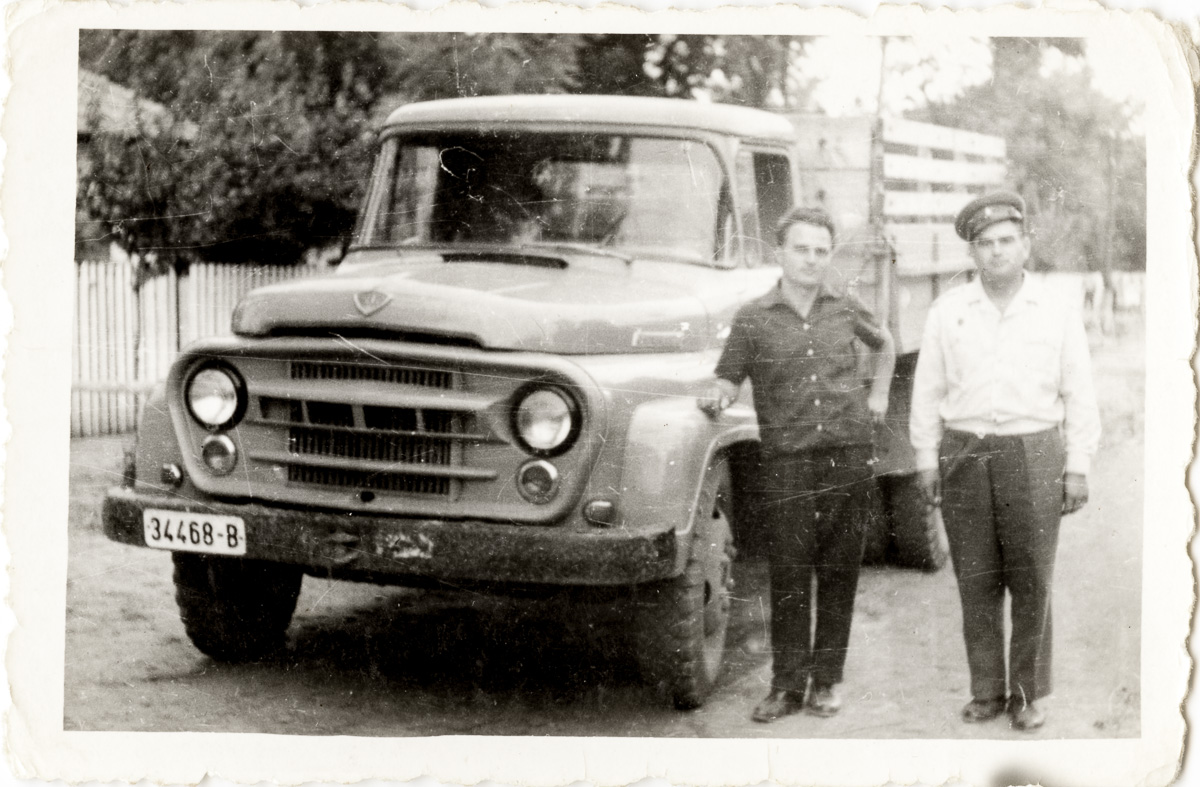 Ion Lupășteanu (dreapta) cu un bărbat lîngă un camion (Autocamion Steagul Rosu SR 131 Carpați) din colecția personală Pîslaru Bogdan Cosmin